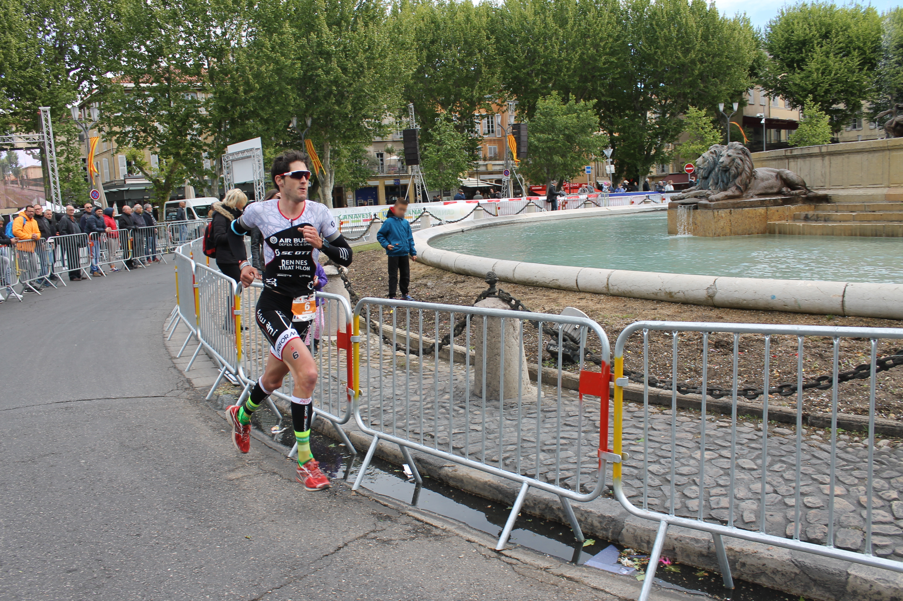 Arnaud Guilloux. Ironman 70.3 Pays d'Aix 2016